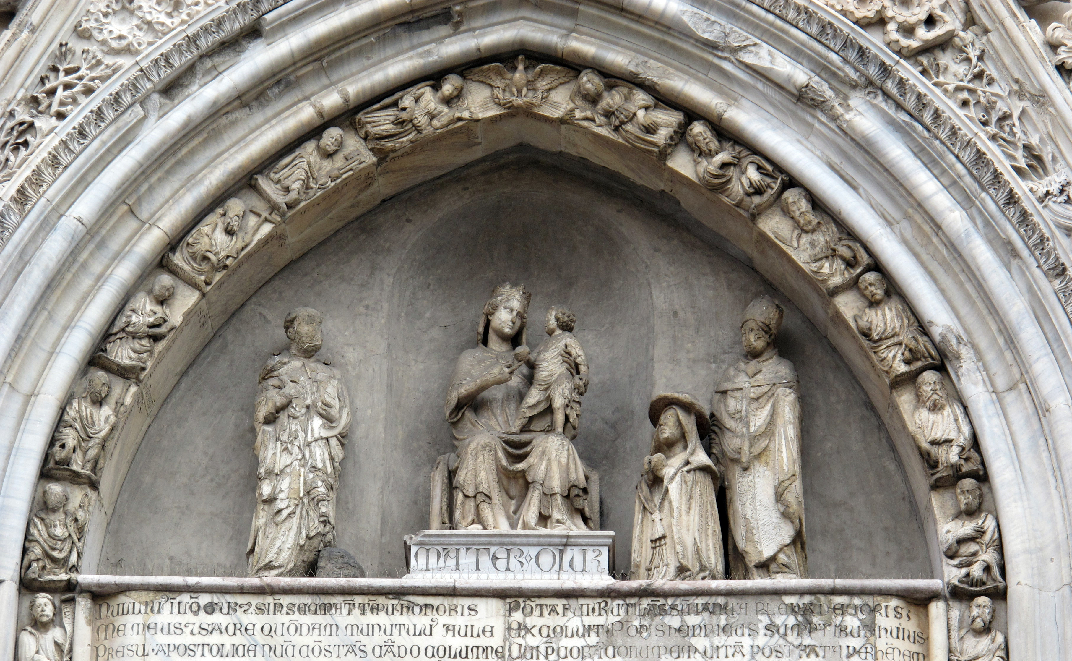 Duomo, Napoli